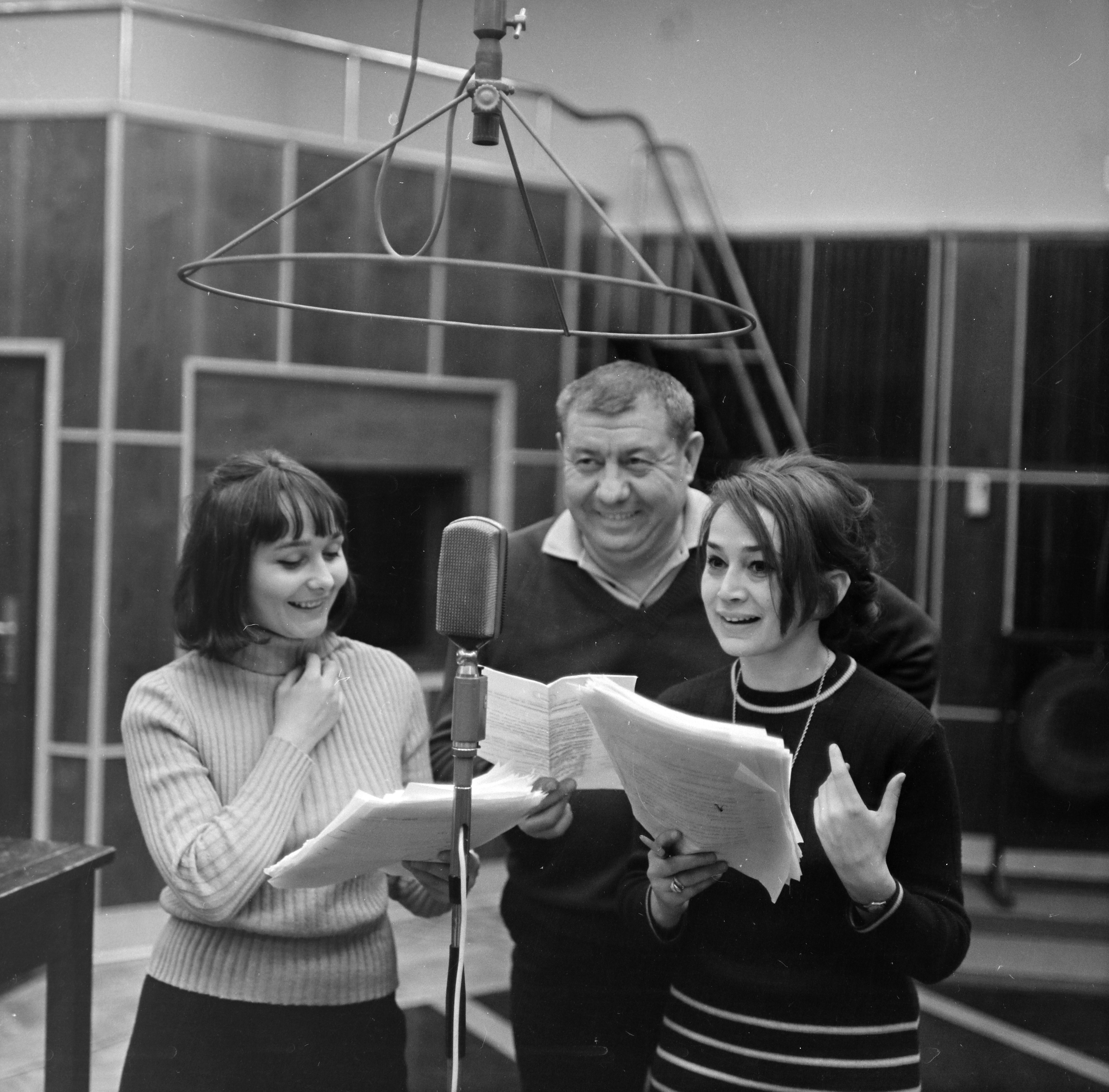 Magda Gabi, Farkas Antal és Margitai Ági színművészek a Magyar Rádió 20-as stúdiójában Simonffy András Két lány apát keres című rádiójátékának felvétele közben